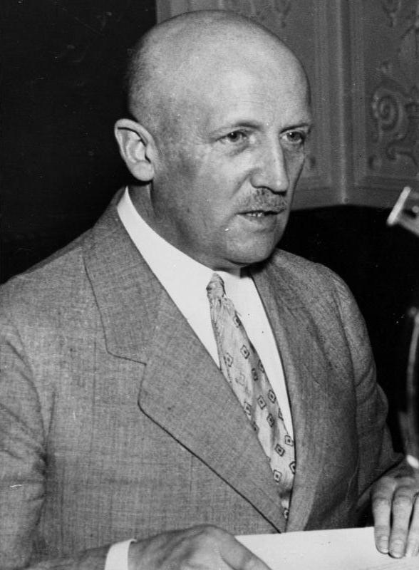 Kurt von Schleicher Zentralbild General Kurt von Schleicher, Politiker und Offizier, geb.: 7.4.1882 in Brandenburg; gest.: ermordet 30.6.1934 in Berlin in Verlauf der Röhmaffäre. Er war 1932 Kriegsminister und von Dezemberr 1932 bis Januar 1933 Reichskanzler. (Aufnahme 1932) [Kurt von Schleicher (Porträt)] Abgebildete Personen: Schleicher, Kurt von: Reichskanzler, Reichswehrminister, General, 1934 ermordet, Deutschland (PND 118608037)